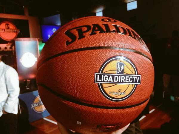 balon liga directv